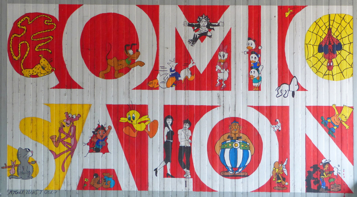 Graffiti unter einer Straßenüberführung an der Äußeren Brucker Straße in Erlangen, erstellt vom Kunst-LK des des Marie-Therese-Gymnasiums Erlangen 2005/2007, bezieht sich auf den Comic-Salon Erlangen